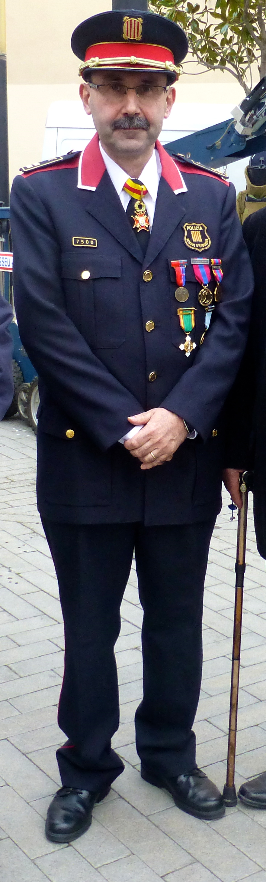 Comissari Joaquim Belenguer, cap de la Regió Policial de Girona de la Policia de la Generalitat Mossos d'Esquadra en els periodes (2005-2007 i 2009-present).